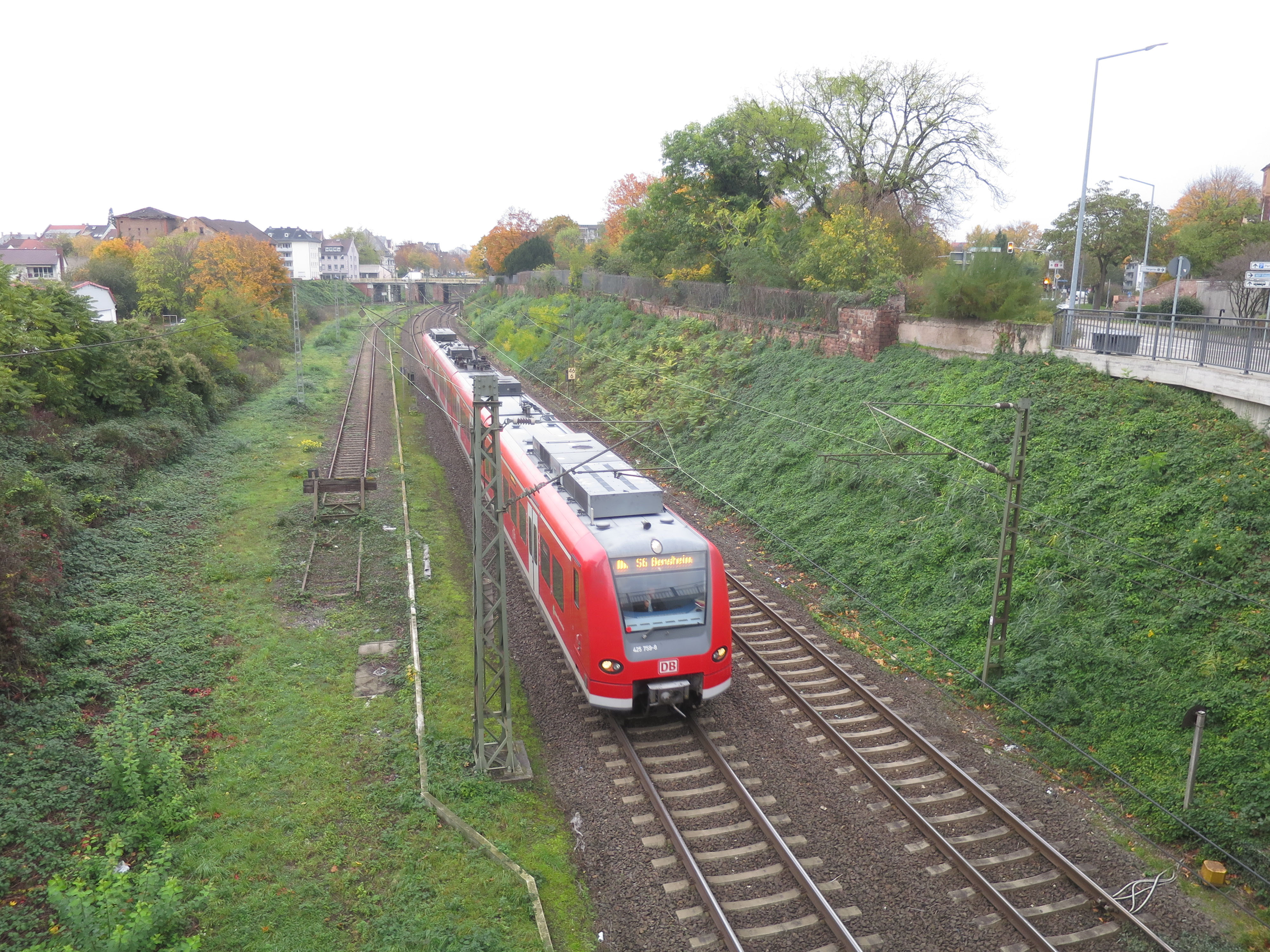 Bahnstrecke Mainz-Mannheim südlich Worms Hbf. Rechts: Wall der äußeren Stadtbefestigung, seit dem Beginn des 18. Jhs. Teil des jüdischen Friedhofs.